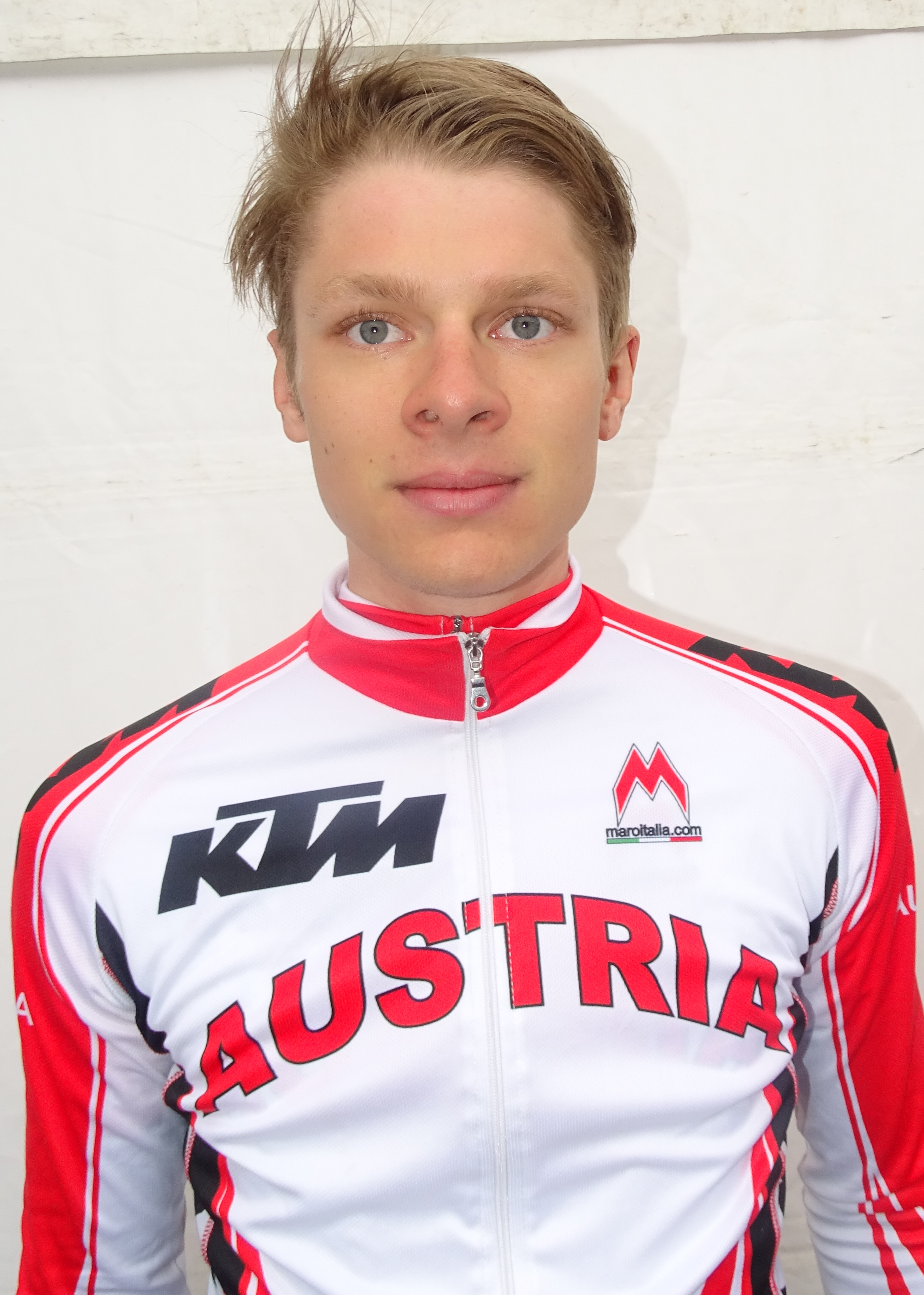 Reportage réalisé le samedi 11 avril à l'occasion du départ et de l'arrivée du Tour des Flandres espoirs 2015 à Audenarde, Belgique.